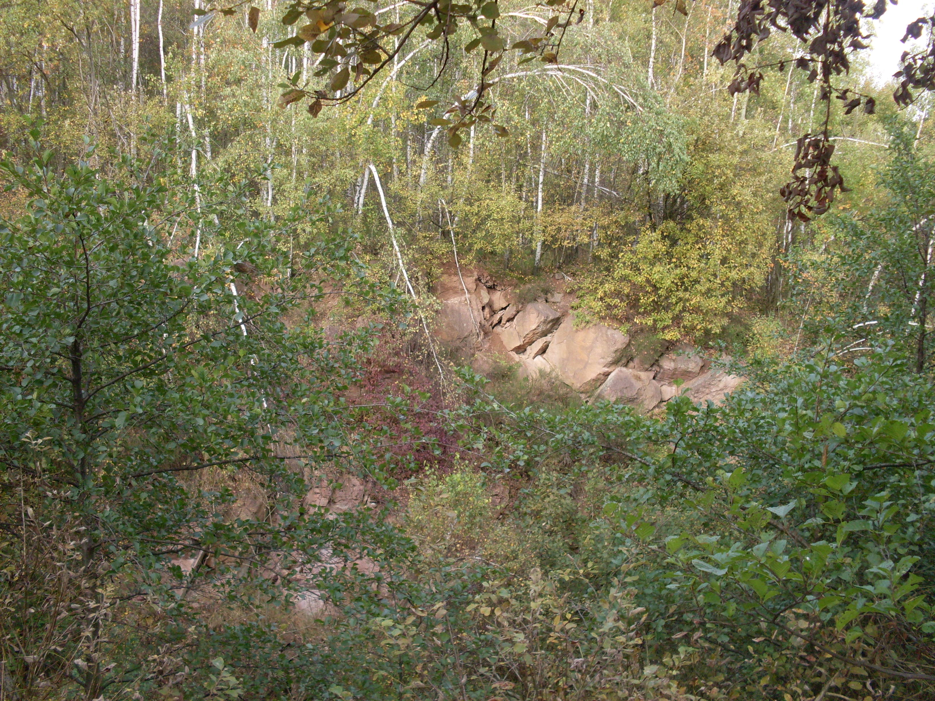 Czerwona Skała.Kowalska Góra